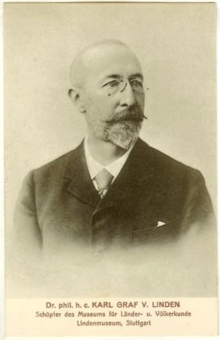 Karl Heinrich von Linden - geboren 28. Mai 1838 in Ulm - gestorben 15. Januar 1910